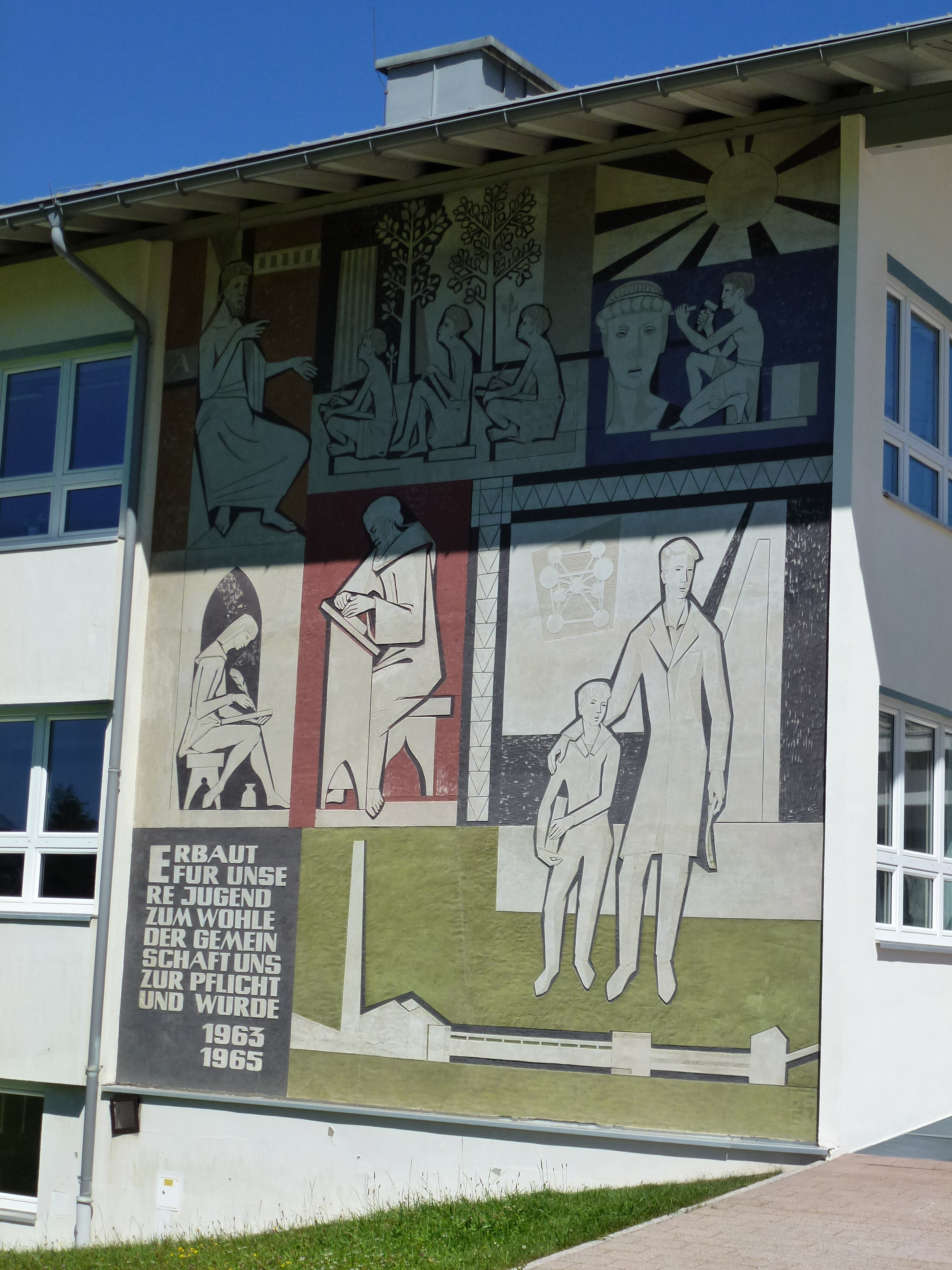 Sgraffito - Schulgasse 2, Hochfilzen